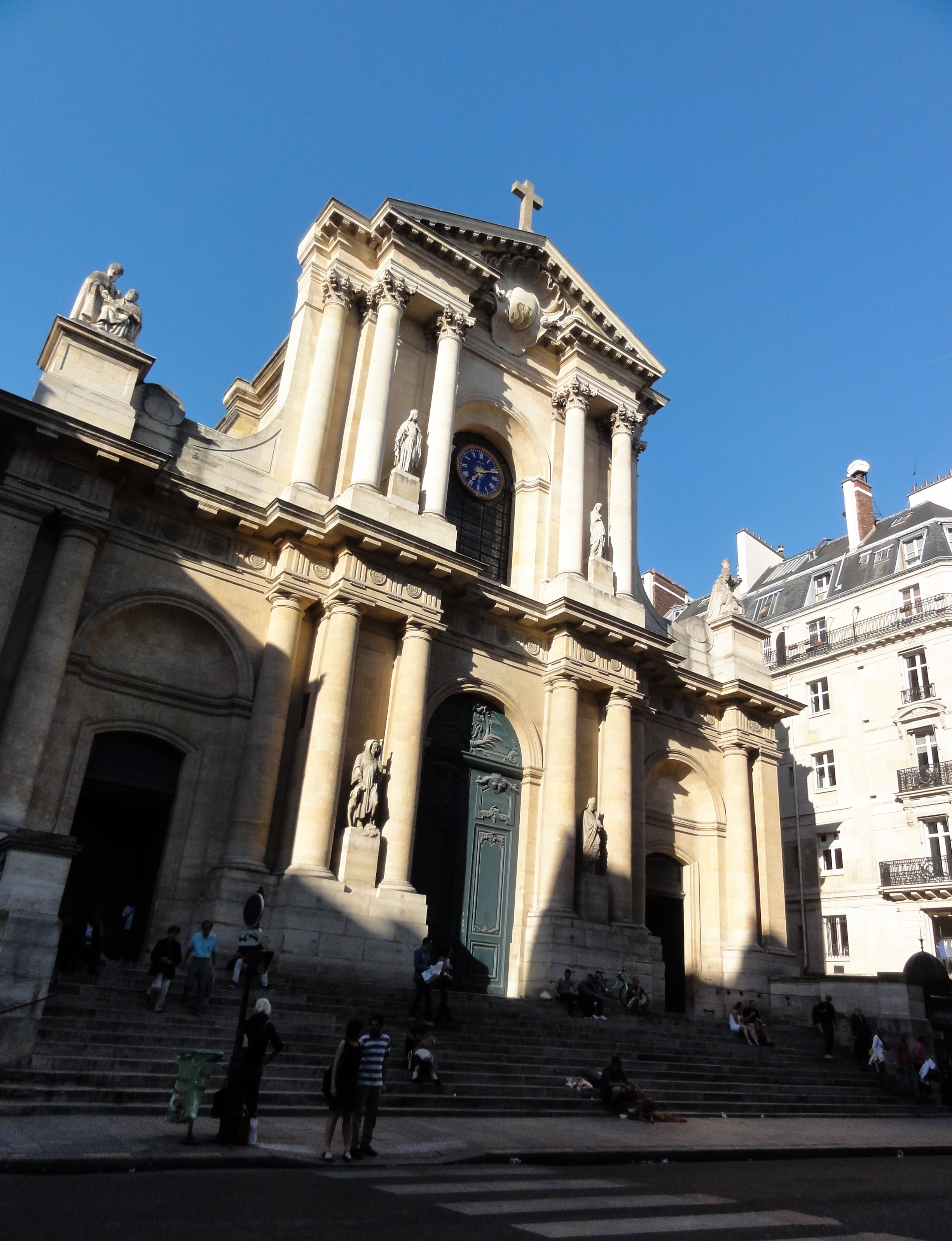 Église Saint-Roch, Paris, France